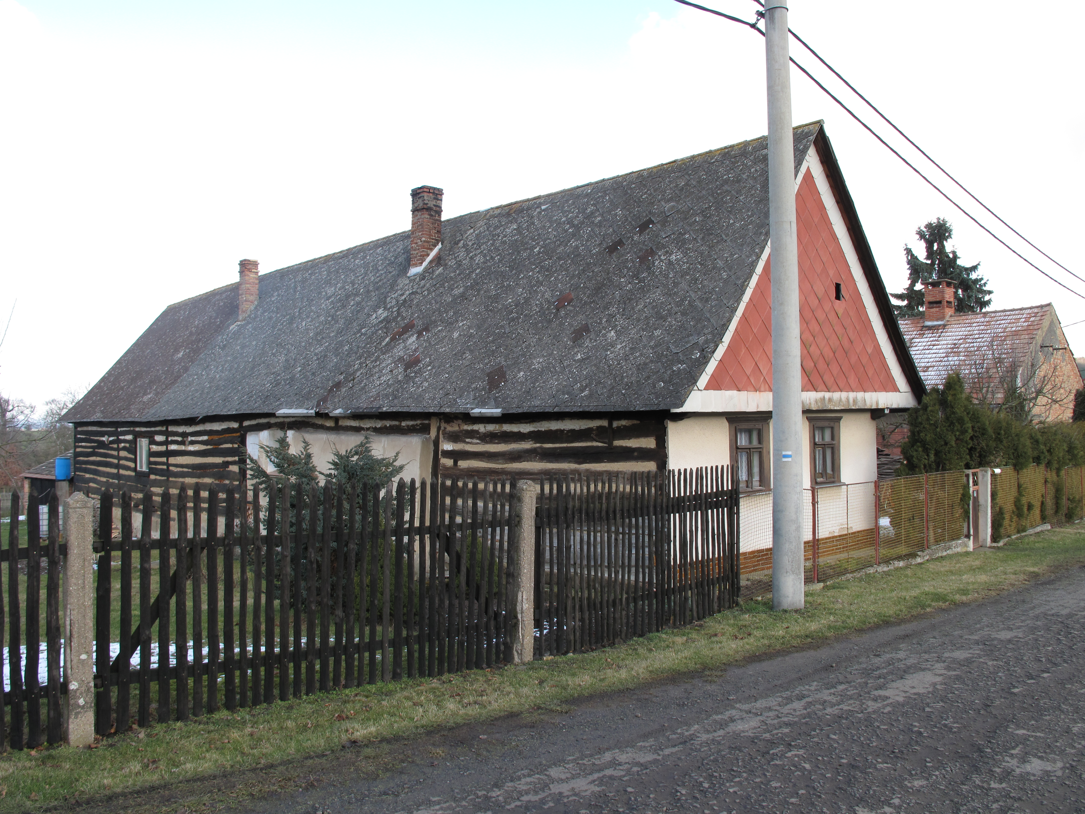 Roubenka v Dolánkách. Okres Mladá Boleslav, Česká republika.